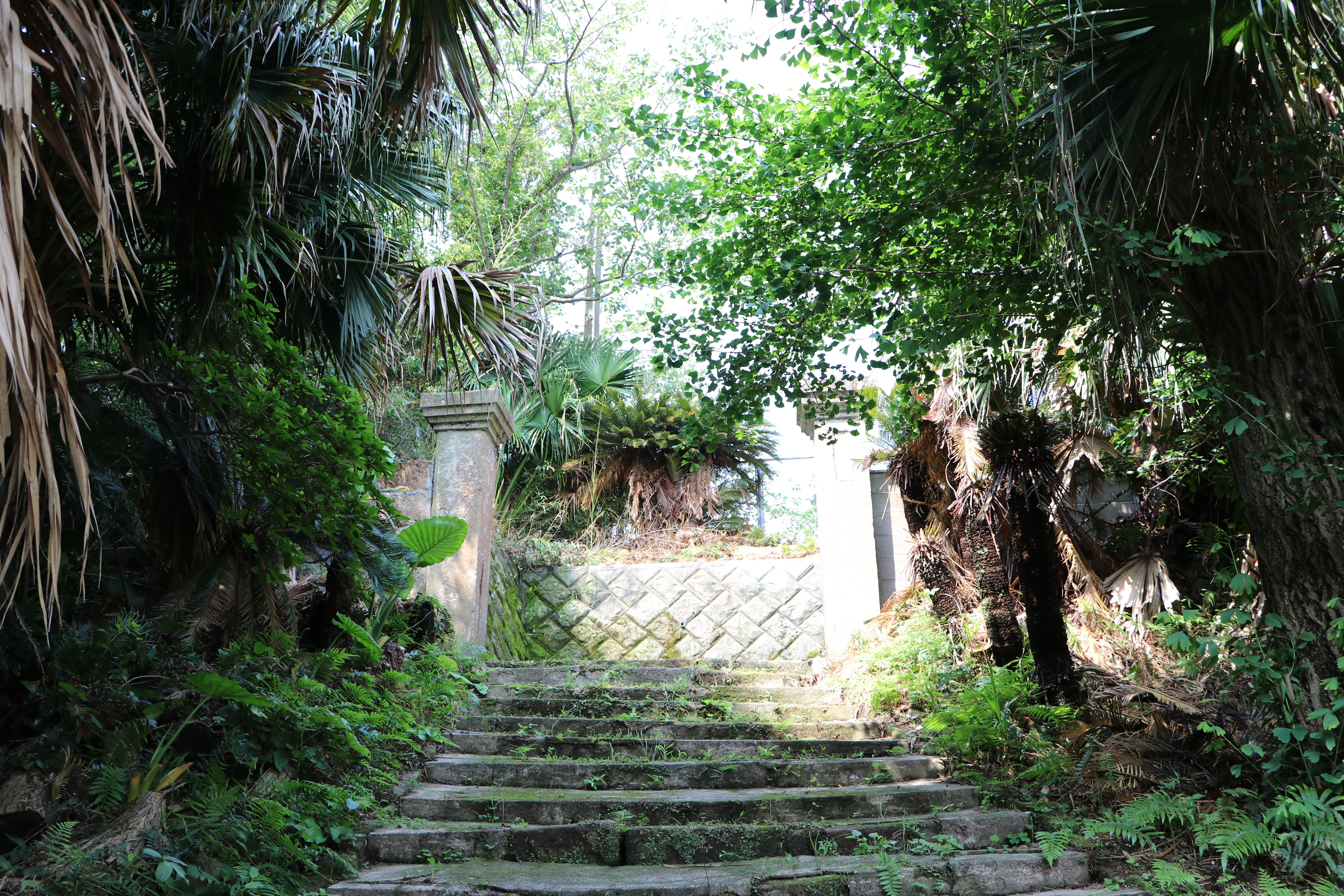 坊津町立秋目小学校跡地にある校門。 Canon EOS 80D